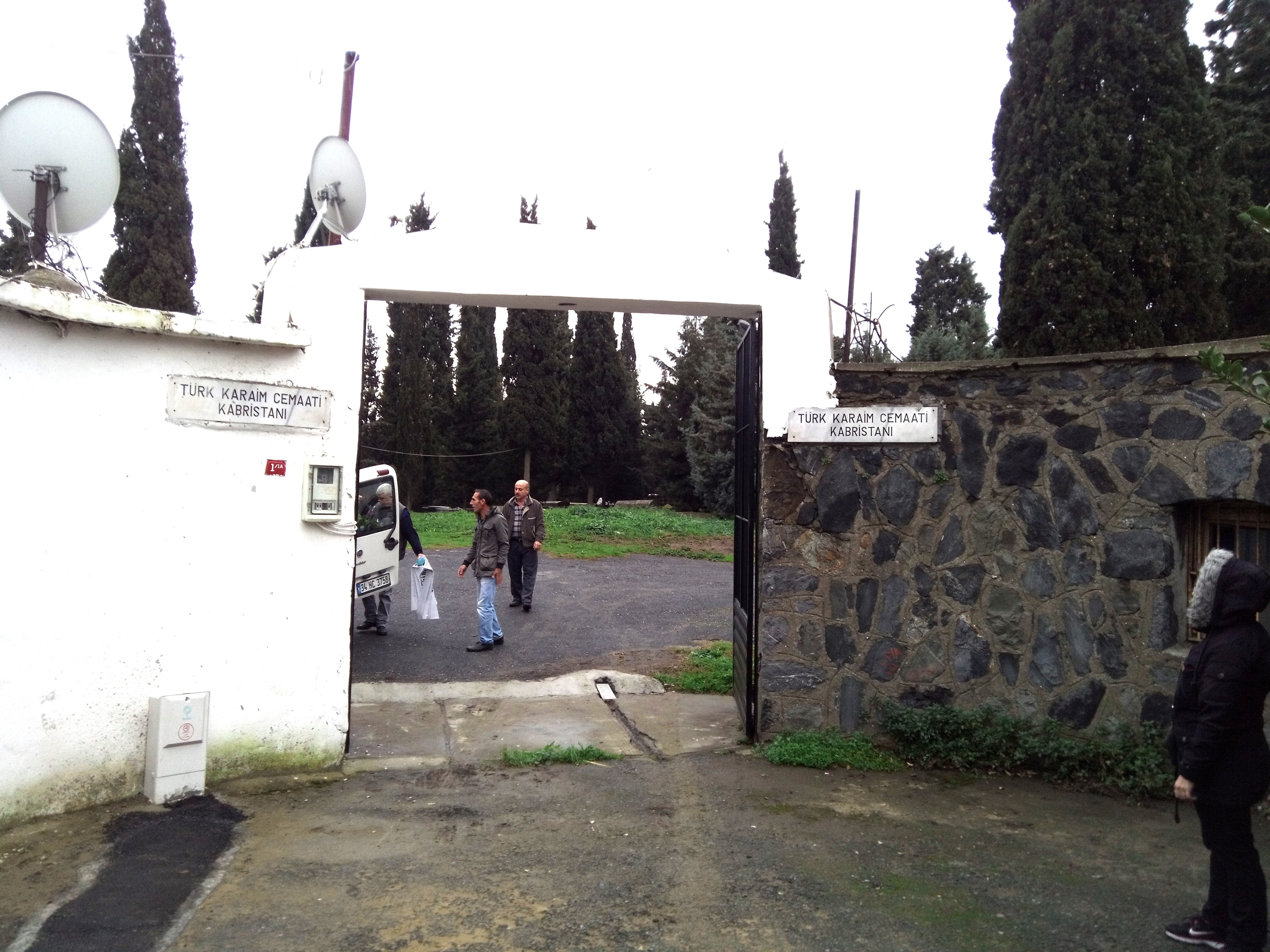 фото А.Кефели